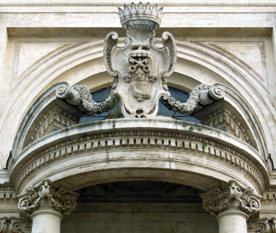 Roma, chiesa di Sant'Andrea al Quirinale